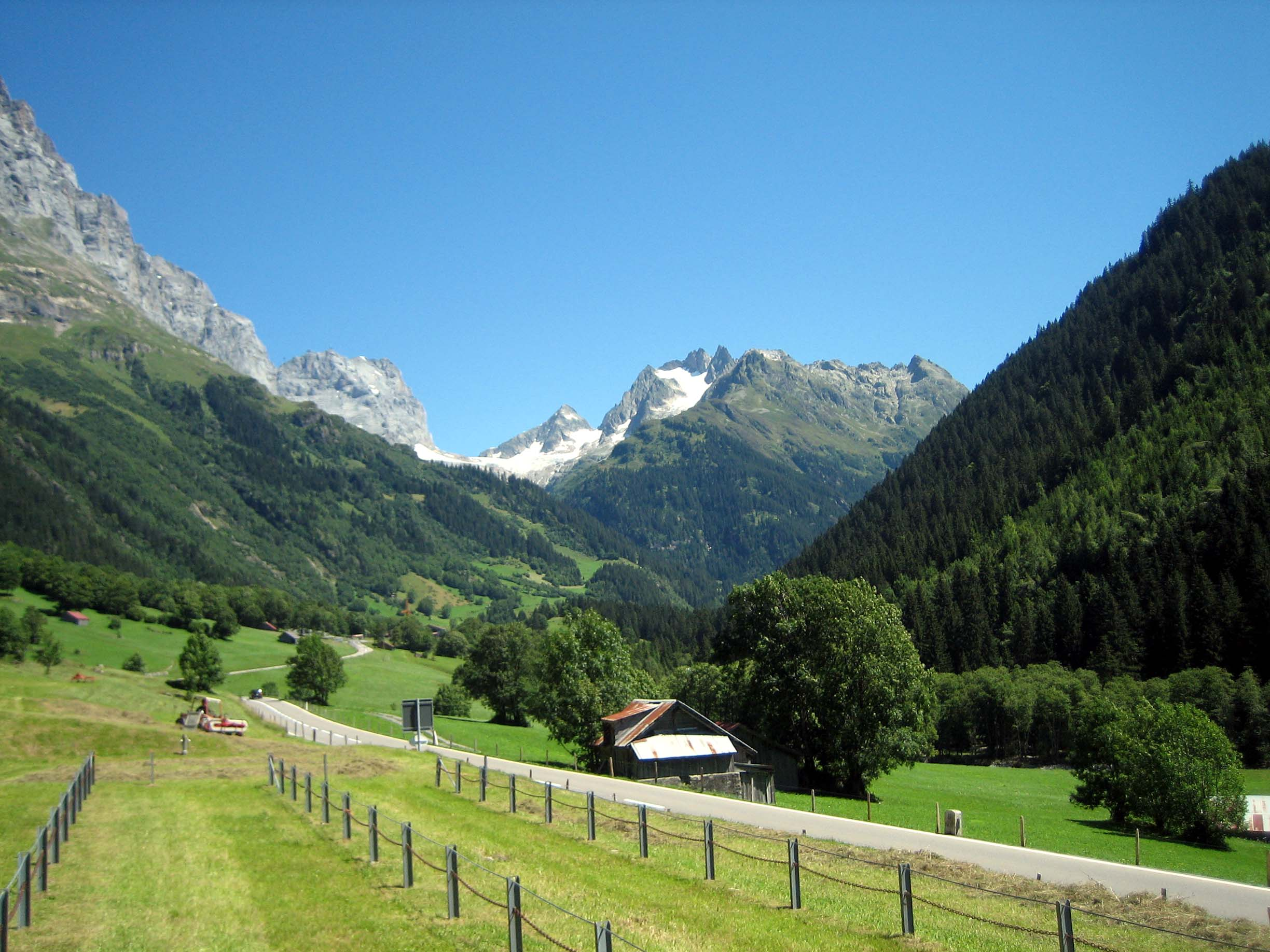 Gadmental bergwärts